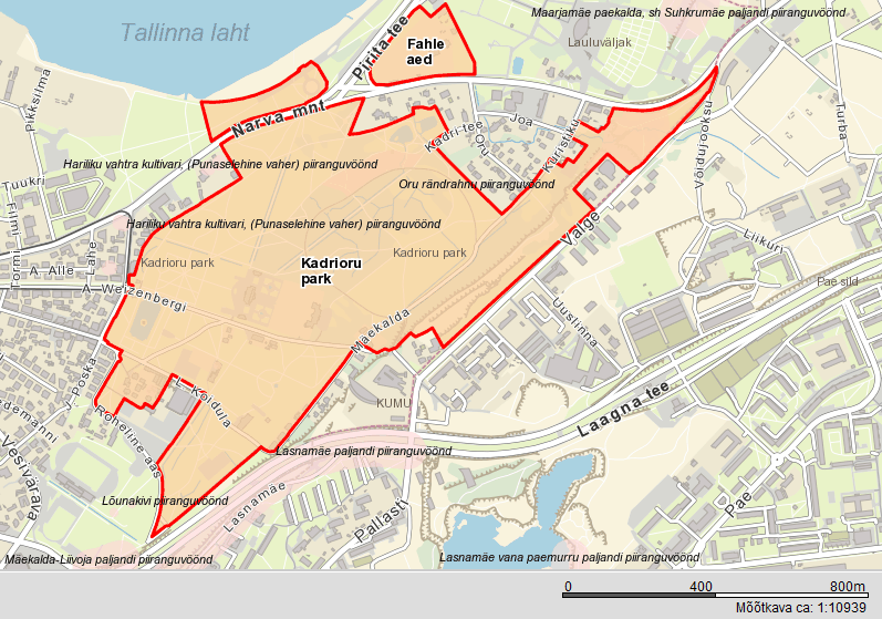 Kadrioru pargi kaart. Põhineb Maa-ameti kaardil.